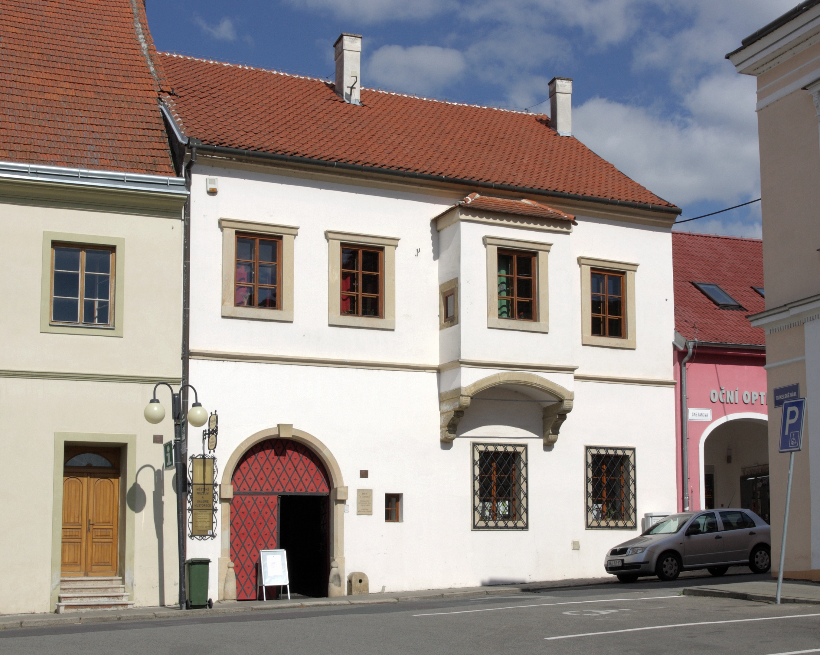 Hustopeče - Dukelské náměstí 23.